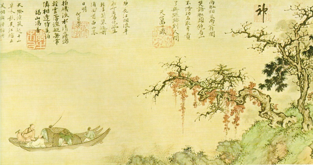 En bateau sur le fleuve à l'automne 1361 par Sheng Mao (1310-1361), section d'un rouleau horizontal avec inscription d'un ami du peintre datée 1361, encre et couleurs sur papier, H. 24,7cm. Taichung (Formose), collections du Musée du Palais.